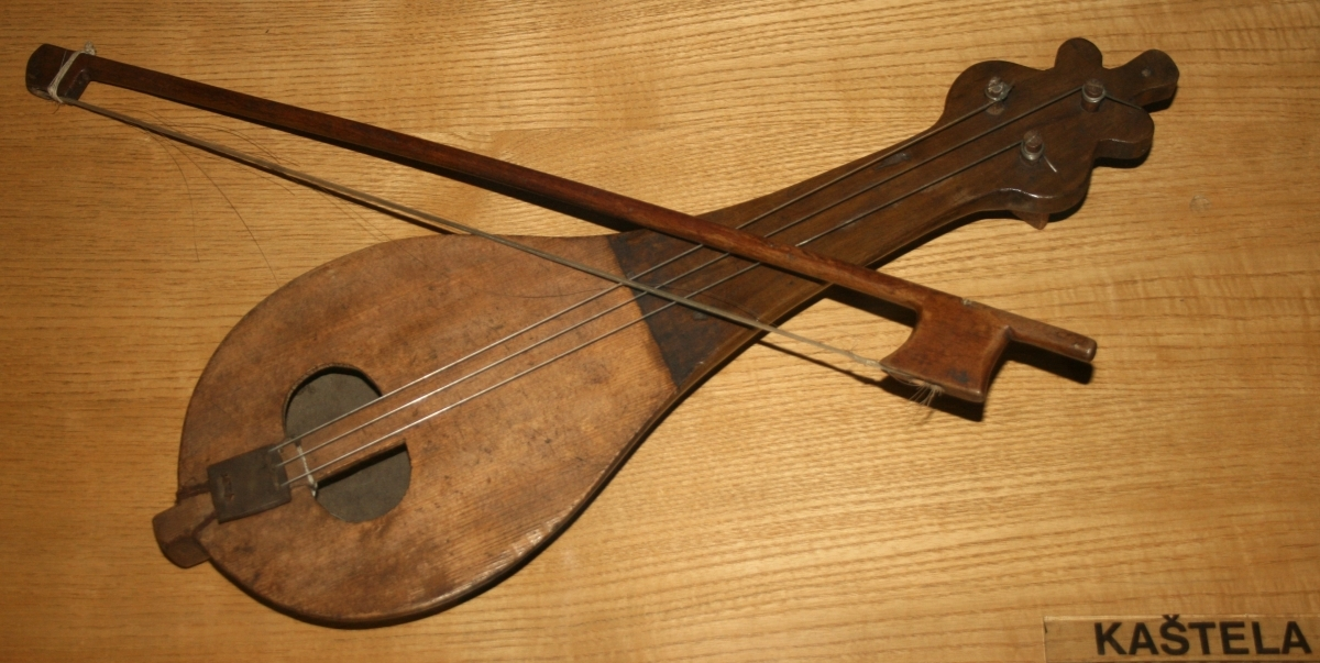 Lirica iz Dalmacije, snimljena tijekom Noći muzeja u Etnografskom muzeju u Zagrebu